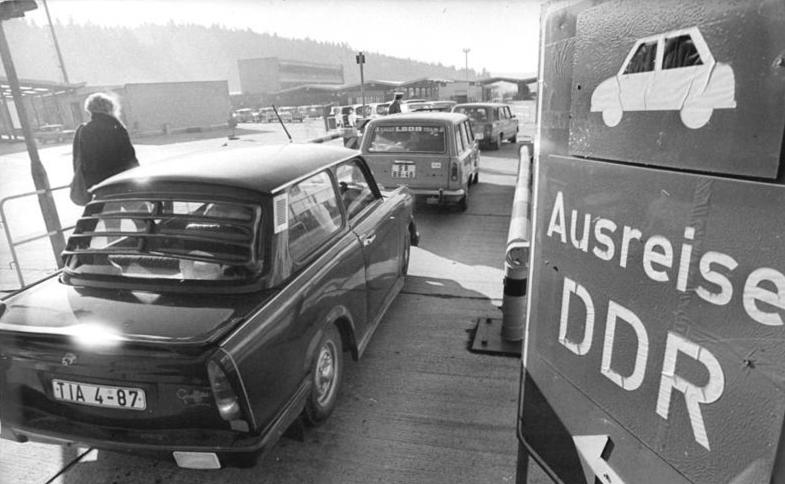 ADN-ZB-Kasper-10.11.89-Bez. Gera: Reiseregelung-Tausende Bürger passierten mit ihrem PKW die Grenzübergangsstelle Hirschberg (Kreis Schleiz). Viele entschieden sich noch während der Fahrt zum tschechoslowakischen Grenzübergang Schöneberg, doch den am nächsten gelegenen Grenzübergang zur BRD zu benutzen.